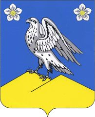 Герб станицы Новомалороссийской